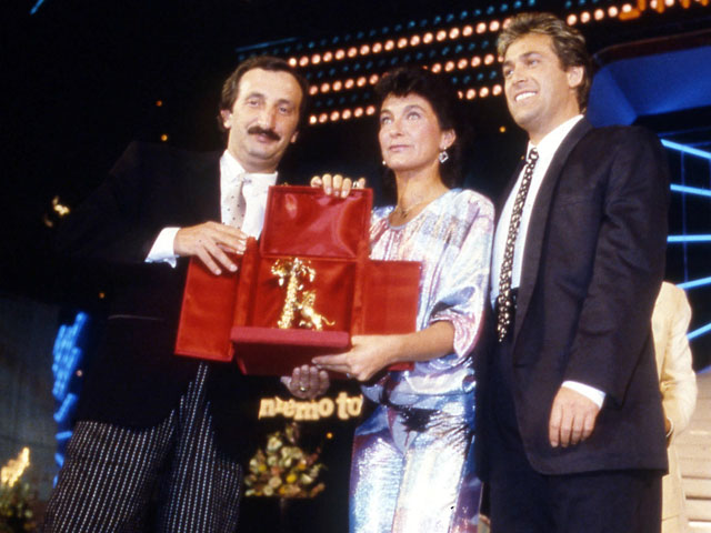 Il gruppo musicale Ricchi e Poveri vincitori del Festival di Sanremo 1985